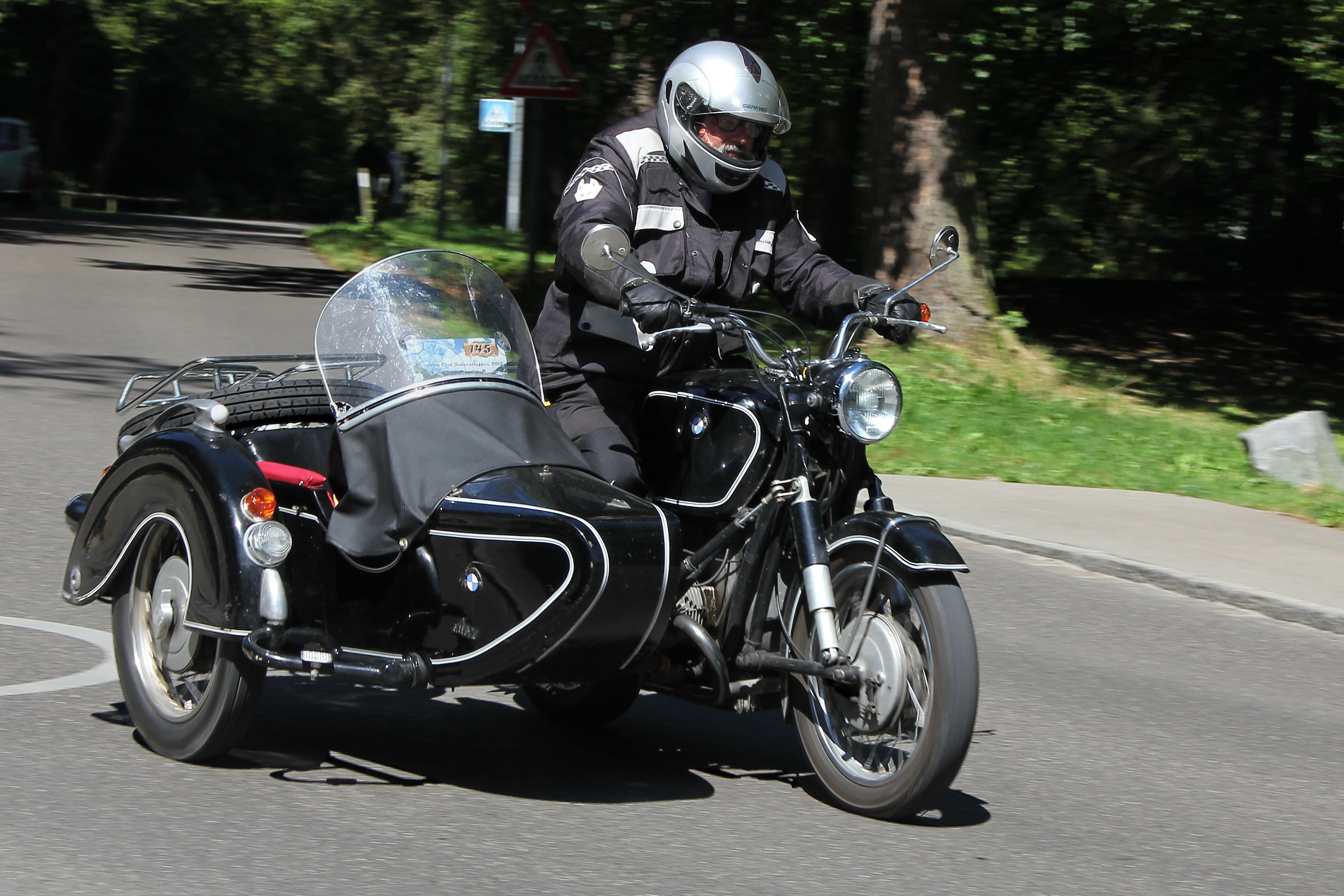 BMW R 69 mit Seitenwagen beim BMW Isetta-Clubtreffen in Bad Wörishofen